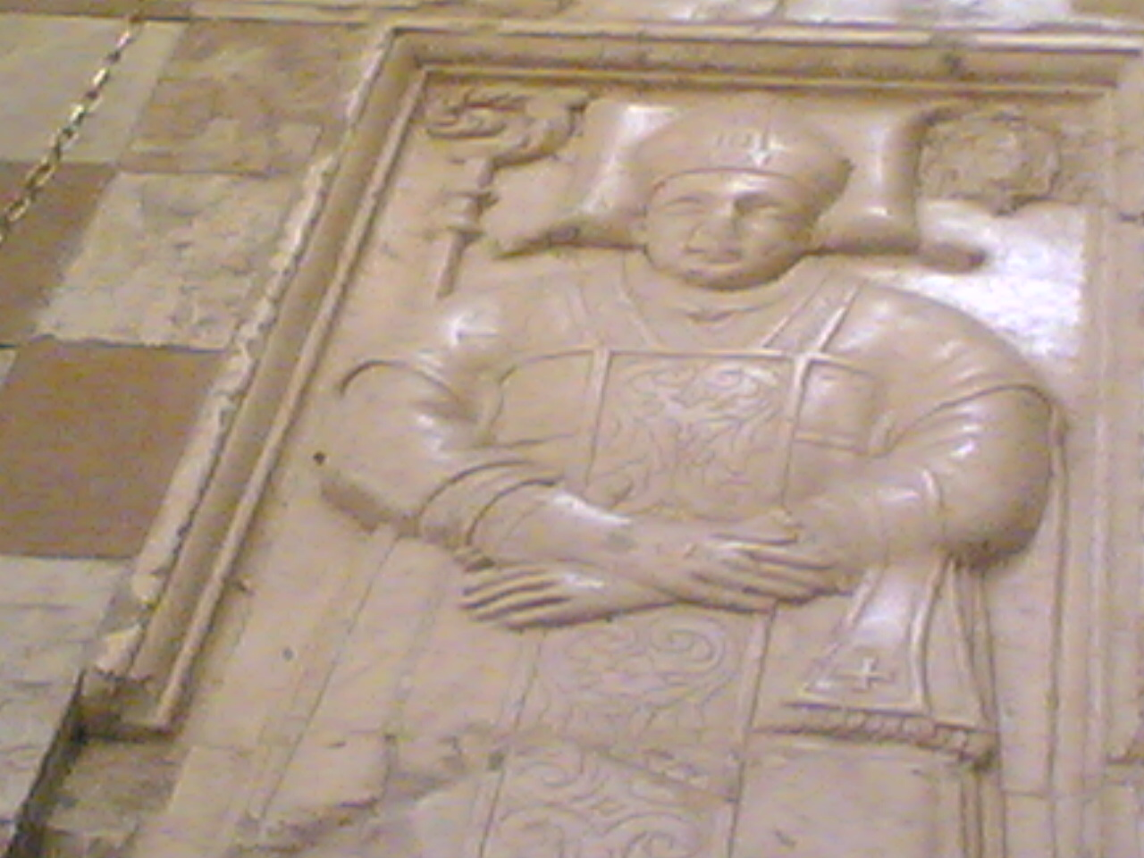 tomba dove vi è sepolto l'Abate Celestino Telera all'interno dell'abazia di Collemaggio (foto scattata il 24 marzo 2007 da me stesso)